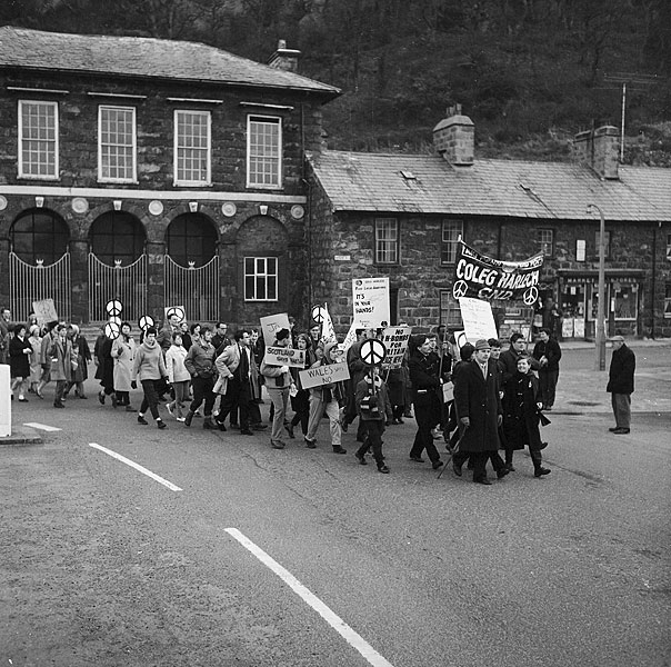 Teitl Cymraeg/Welsh title: Gorymdaith ddeuddydd gan CND o Gricieth i Flaenau Ffestiniog Ffotograffydd/Photographer: Geoff Charles (1909-2002) Dyddiad/Date: 1/3/1962 Cyfrwng/Medium: Negydd ffilm / Film negative Cyfeiriad/Reference: (gch26766) Rhif cofnod / Record no.: 3471225 Rhagor o wybodaeth am gasgliad Geoff Charles yn Llyfrgell Genedlaethol Cymru More information about the Geoff Charles Collection at the National Library of Wales Mae ffotograffau Geoff Charles hefyd yn rhan o Broject Europeana Libraries Geoff Charles' photographs also form part of the Europeana Libraries Project